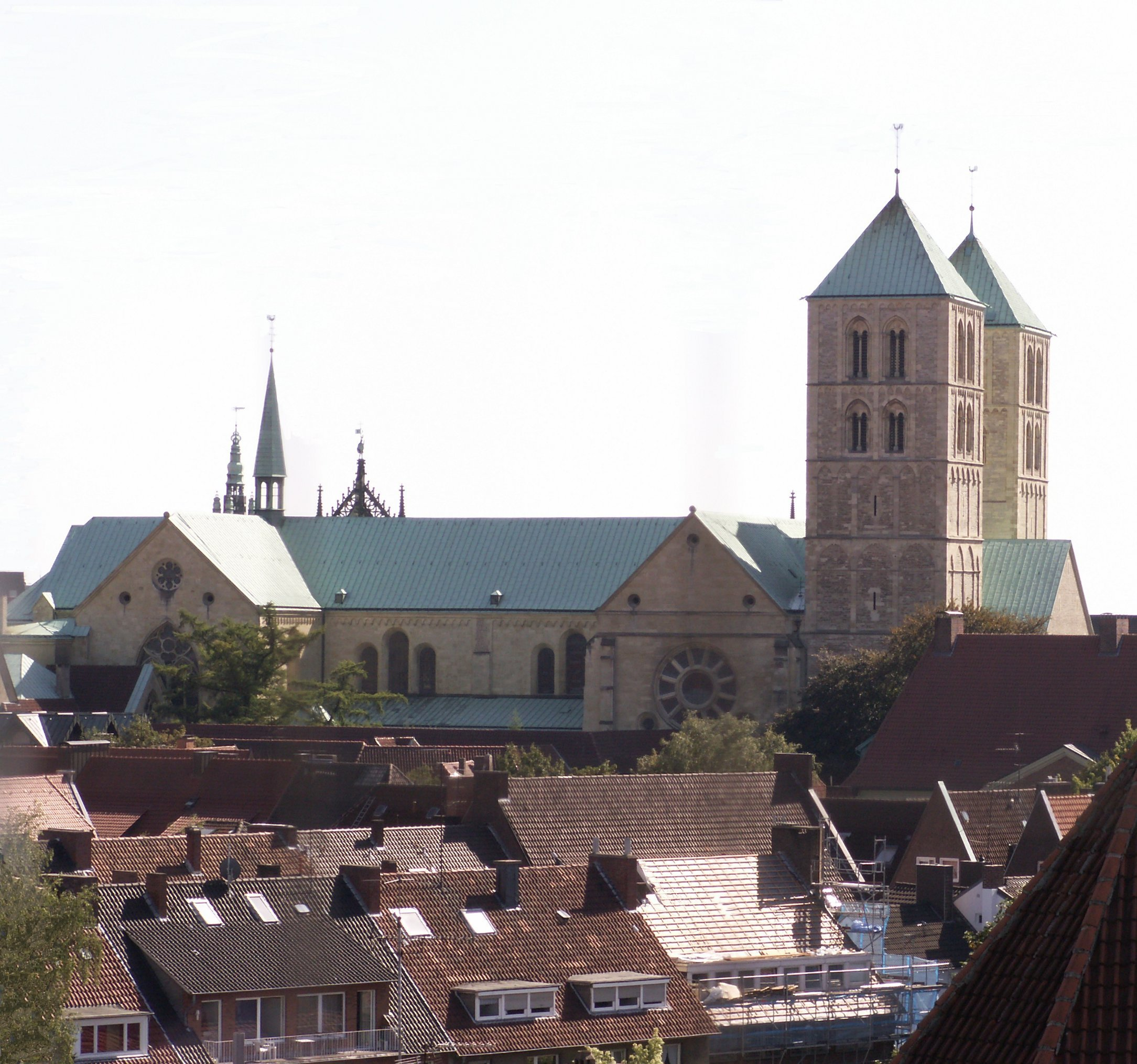 Münster, Deutschland: St.-Paulus-Dom - Luftaufnahme aus dem Buddenturm